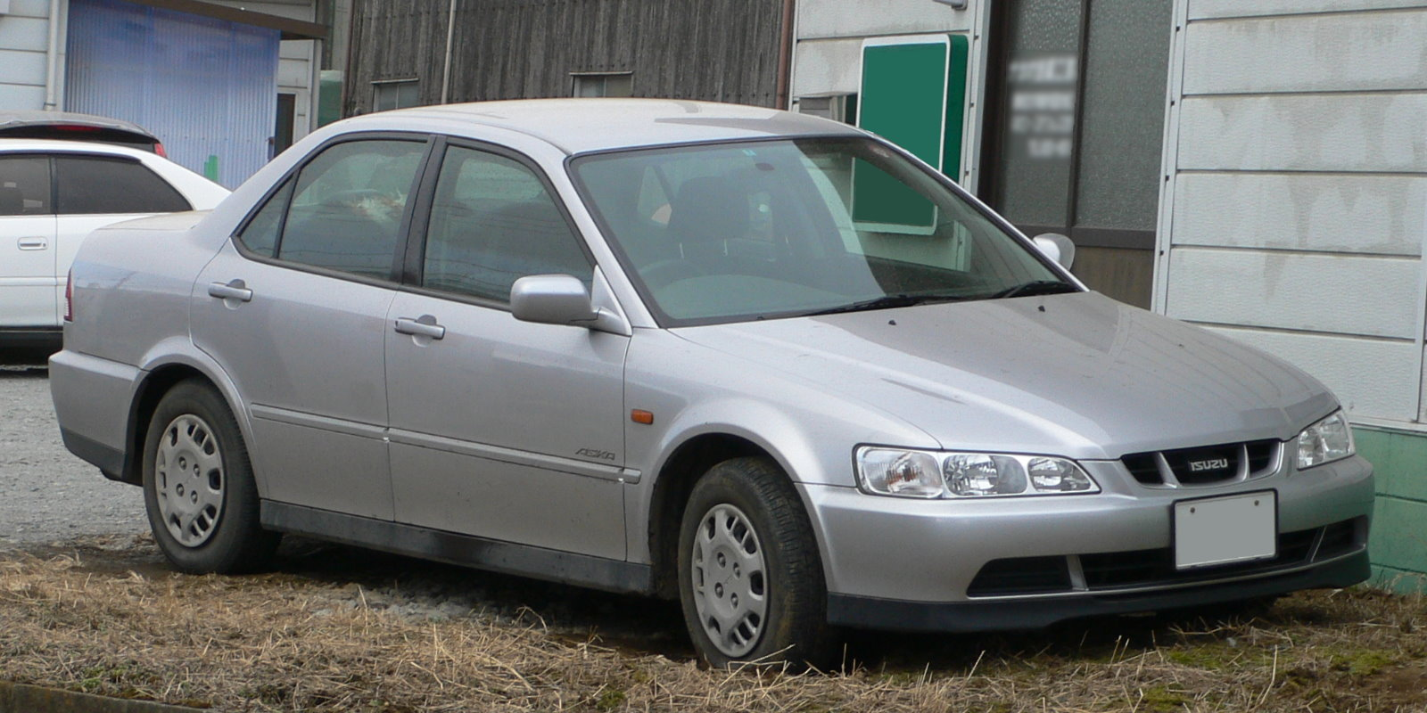 4th generation Isuzu_Aska